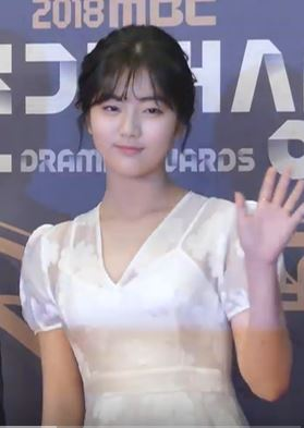 30일 오후 서울시 마포구 상암동 MBC 미디어센터 공개홀에서 '2018 MBC 연기대상' 식전 행사인 레드카펫이 열려 드라마 '배드파파'팀 김재경X하준X신은수 배우가 포토월에서 포즈를 취하고 있다.